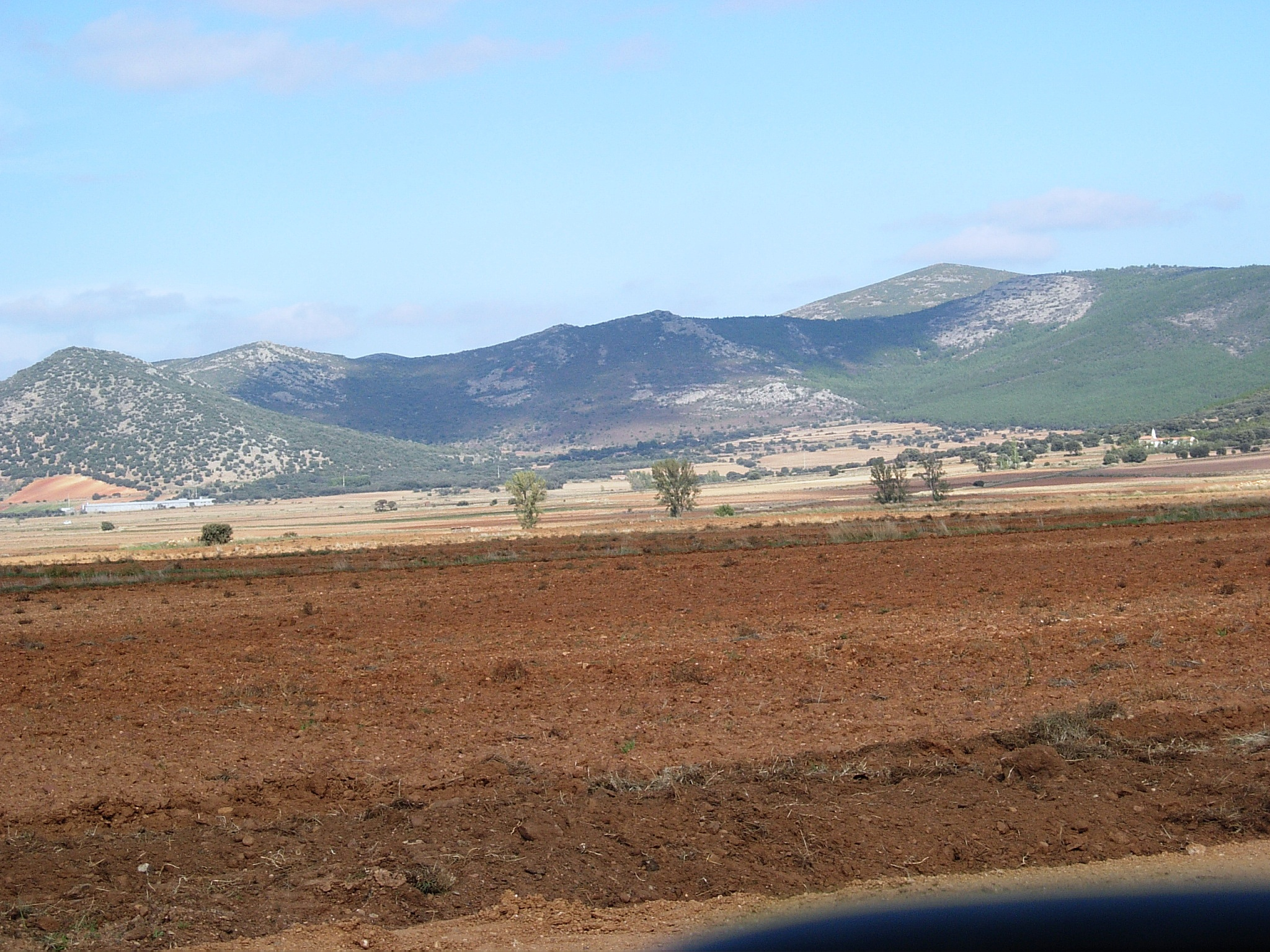 Paisaje Aragonés en la provincia de Zaragoza.